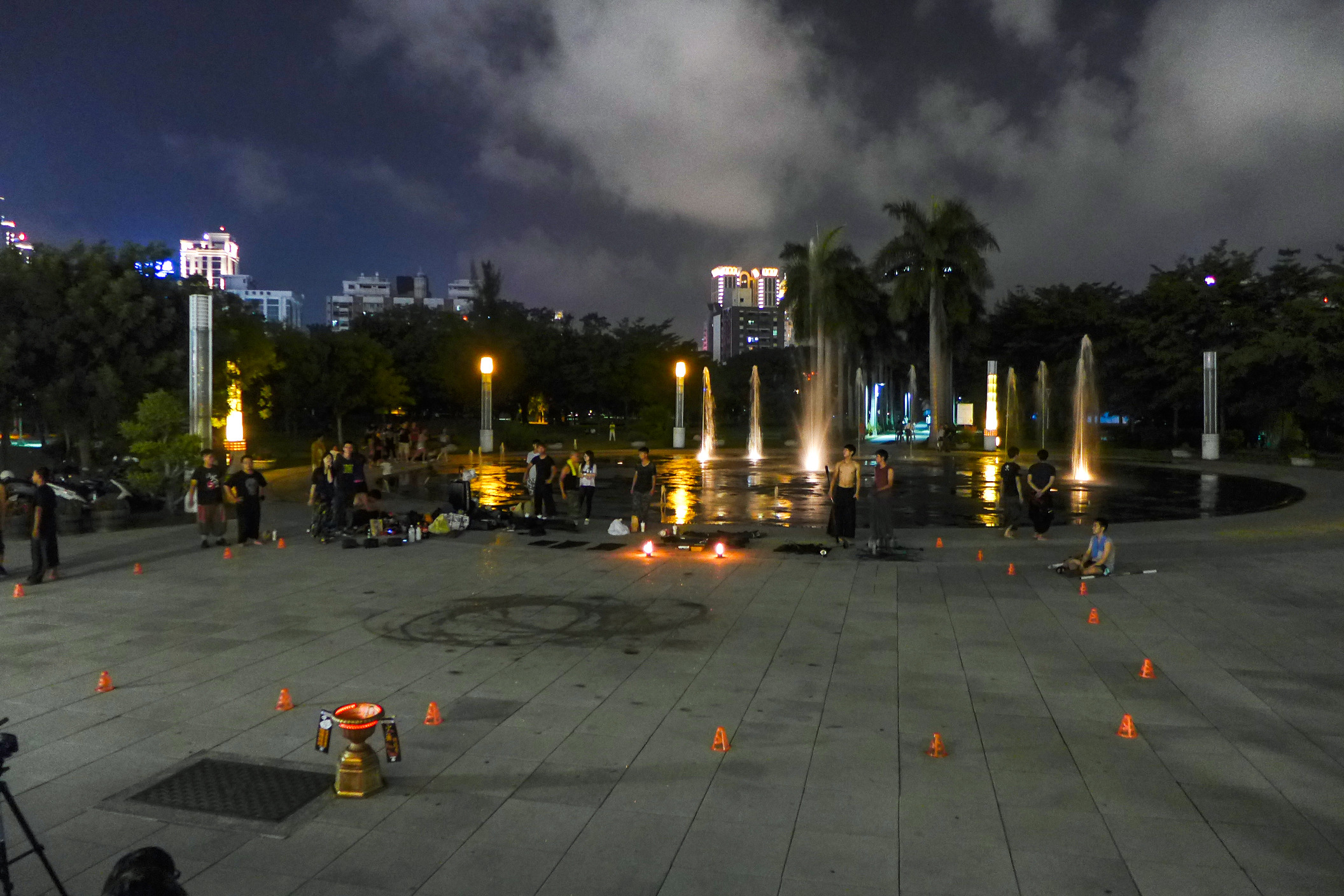 Kaohsiung Central Park